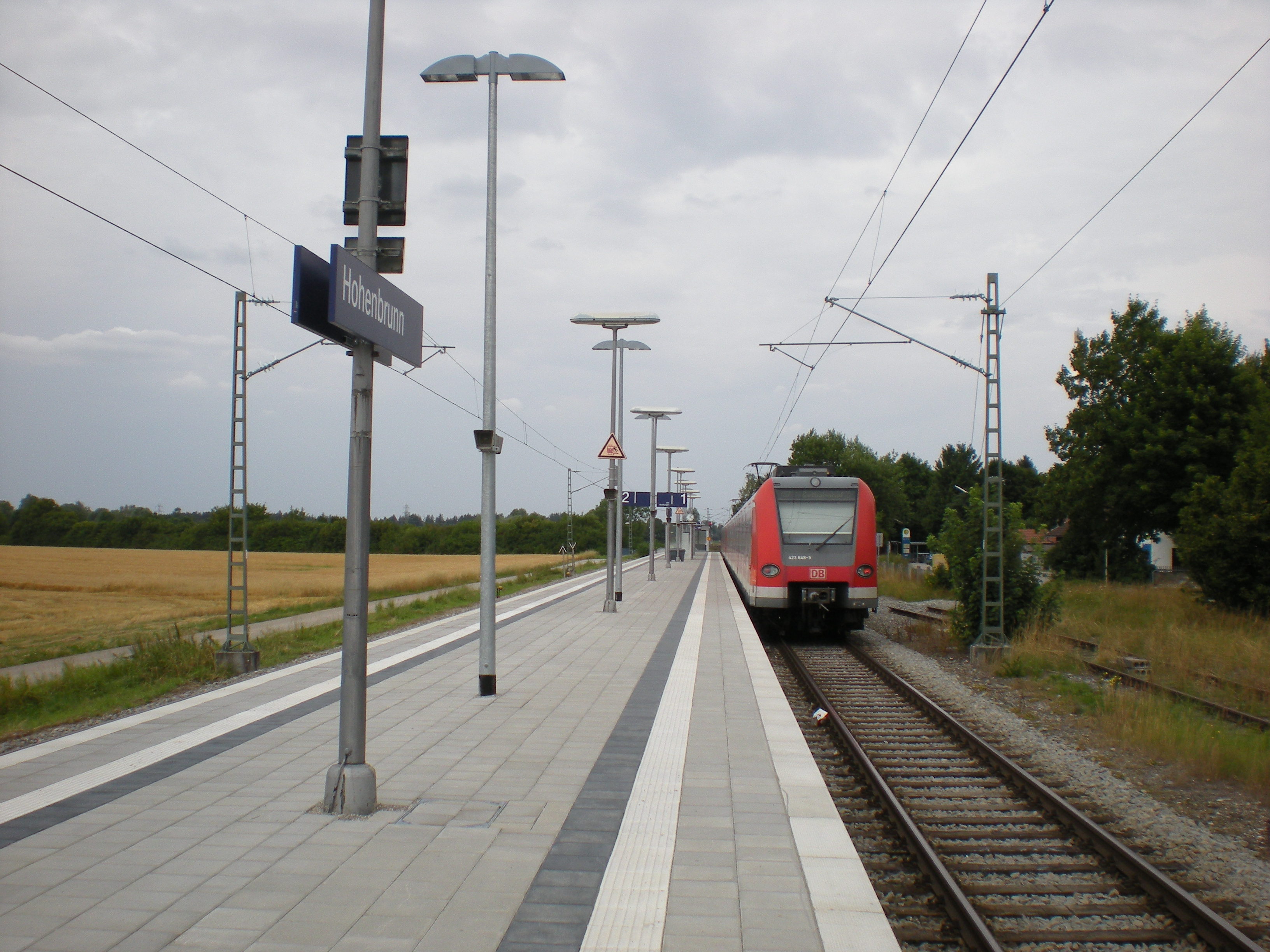 Mittelbahnsteig des S-Bahnhofs Hohenbrunn